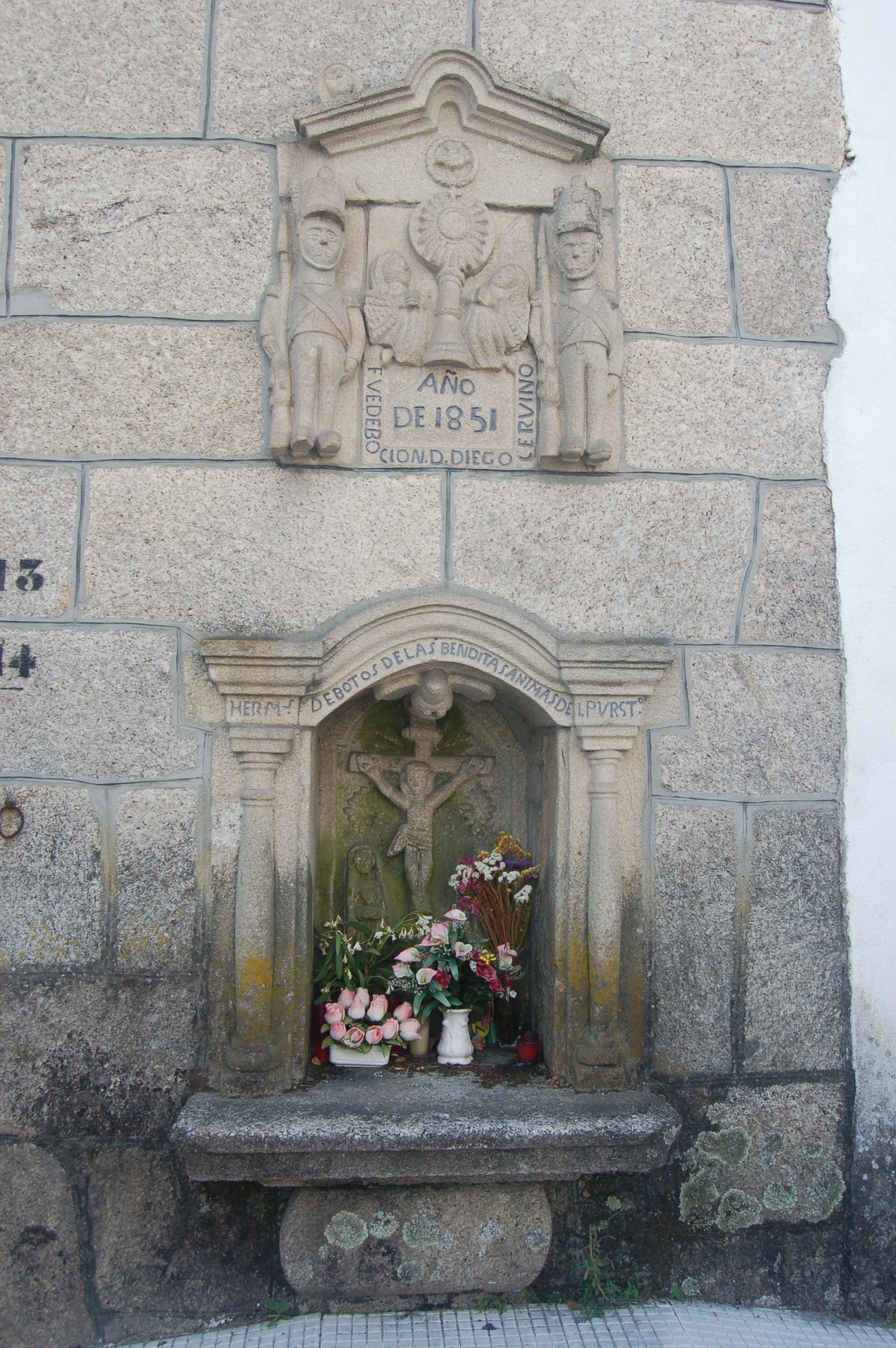 Peto de ánimas dos Gardas Civís de Ponte Bora, no Pío, Bora (Pontevedra).